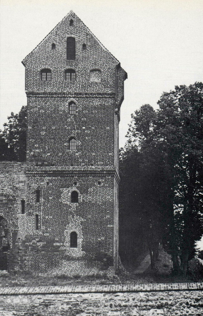 Die Burg Balga in den 30er Jahren